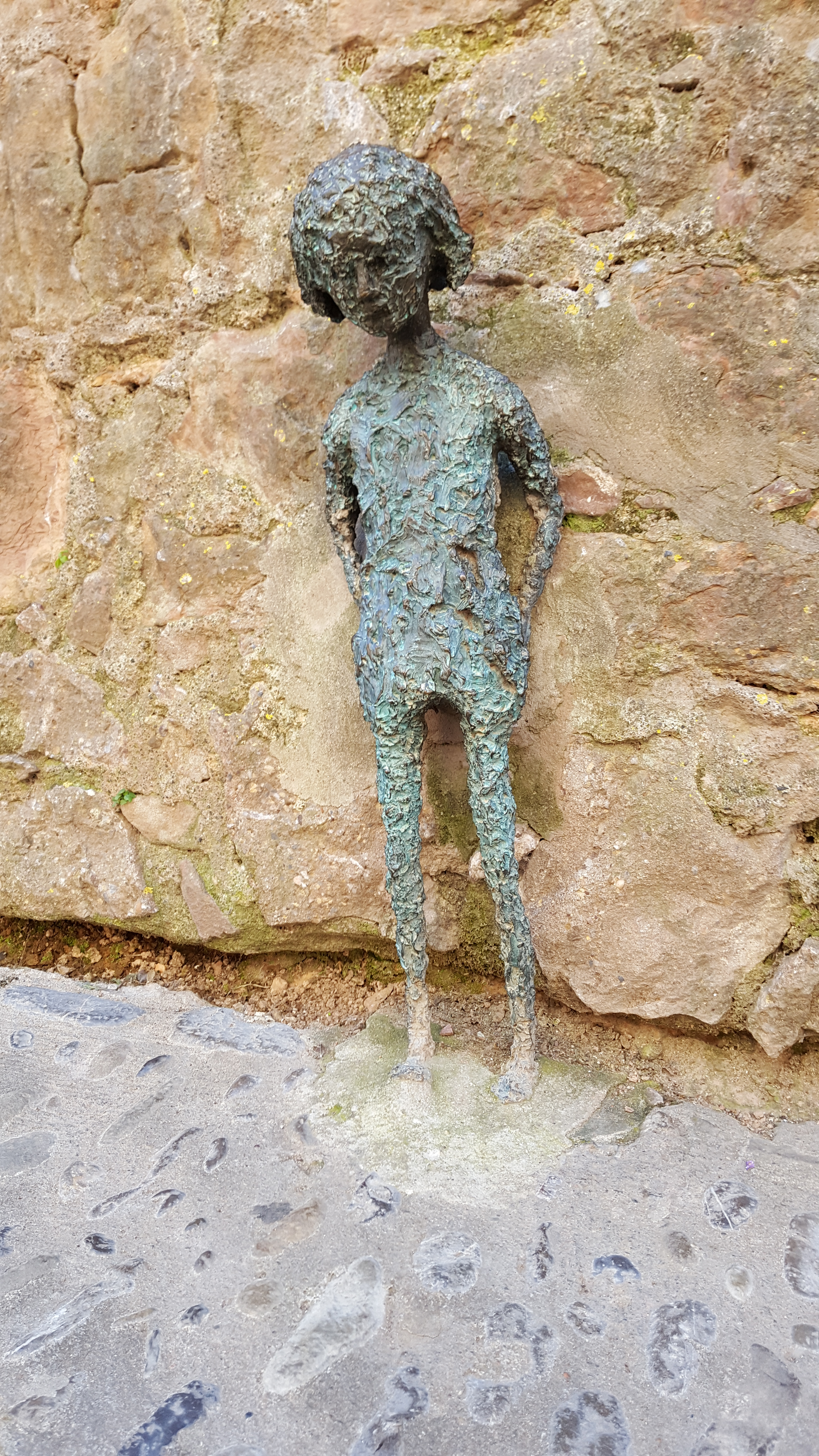 Figur von Anna Manel.la in Santa Pau, Katalonien, im mittelalterlichen Ortskern, nahe der Burg; Originaltitel: "Secrets" (Geheimnisse), 1992